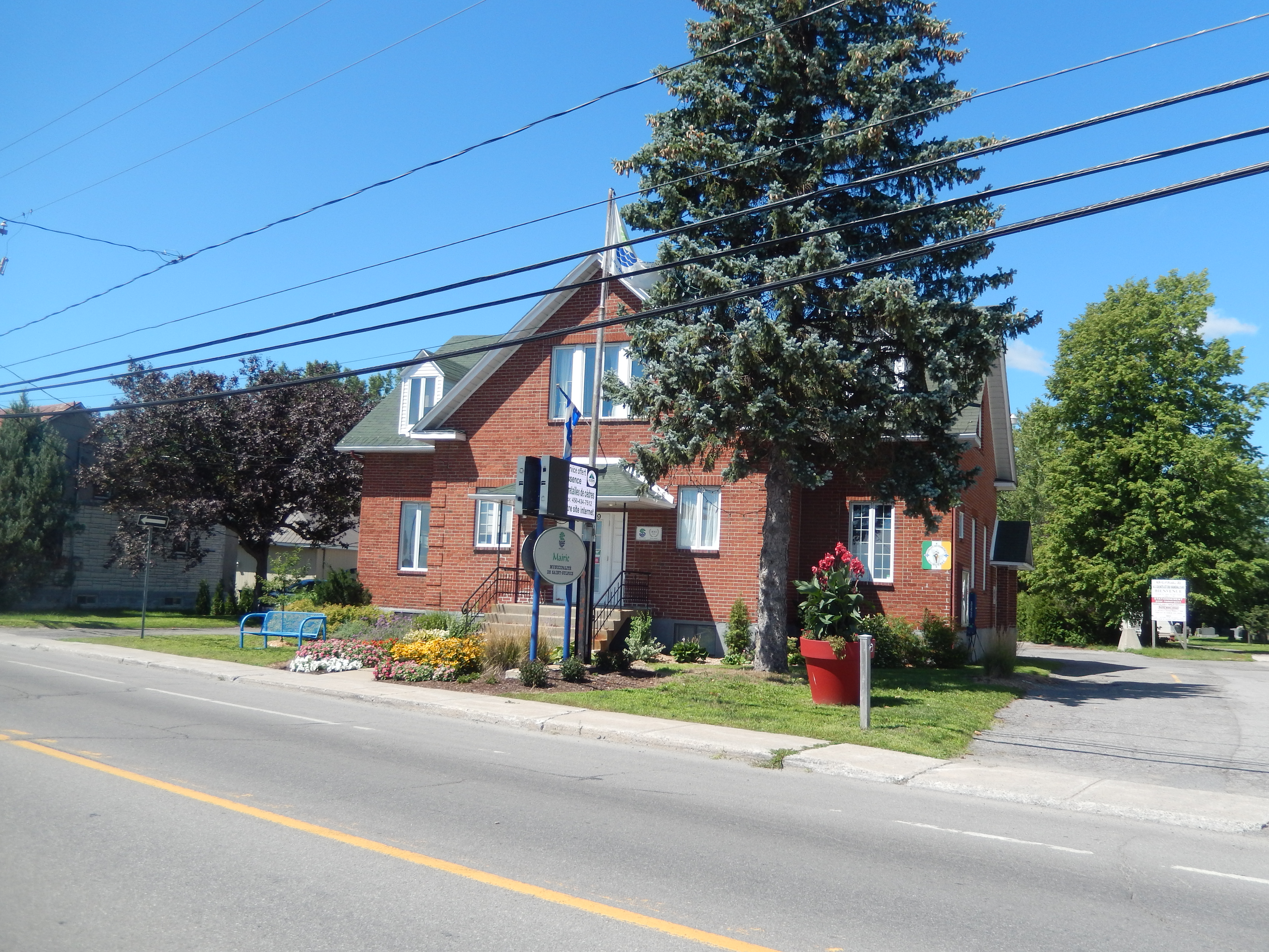 Mairie de Saint-Sulpice en août 2020.